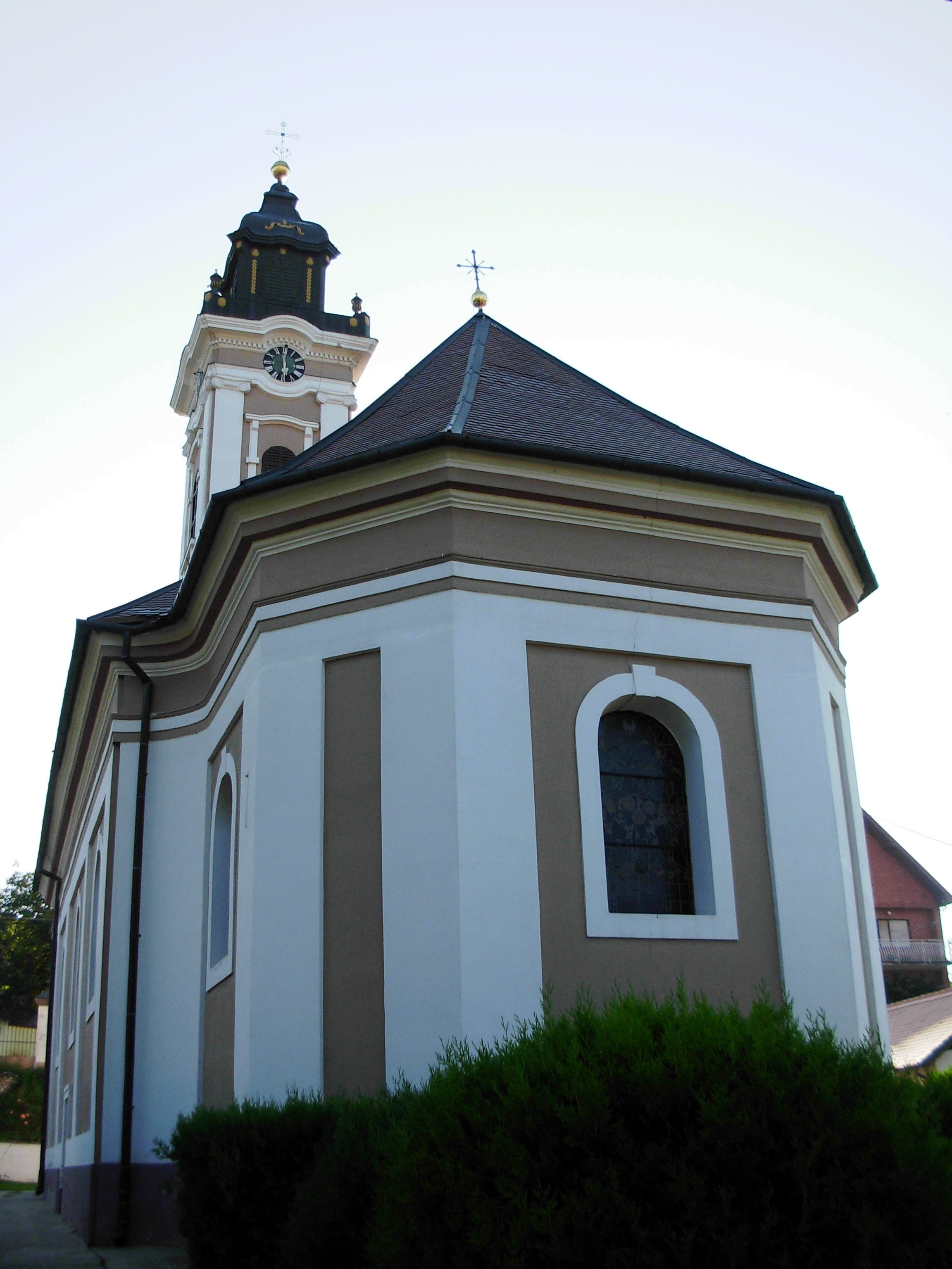 Crkva Vaznesenja u Bukovcu.